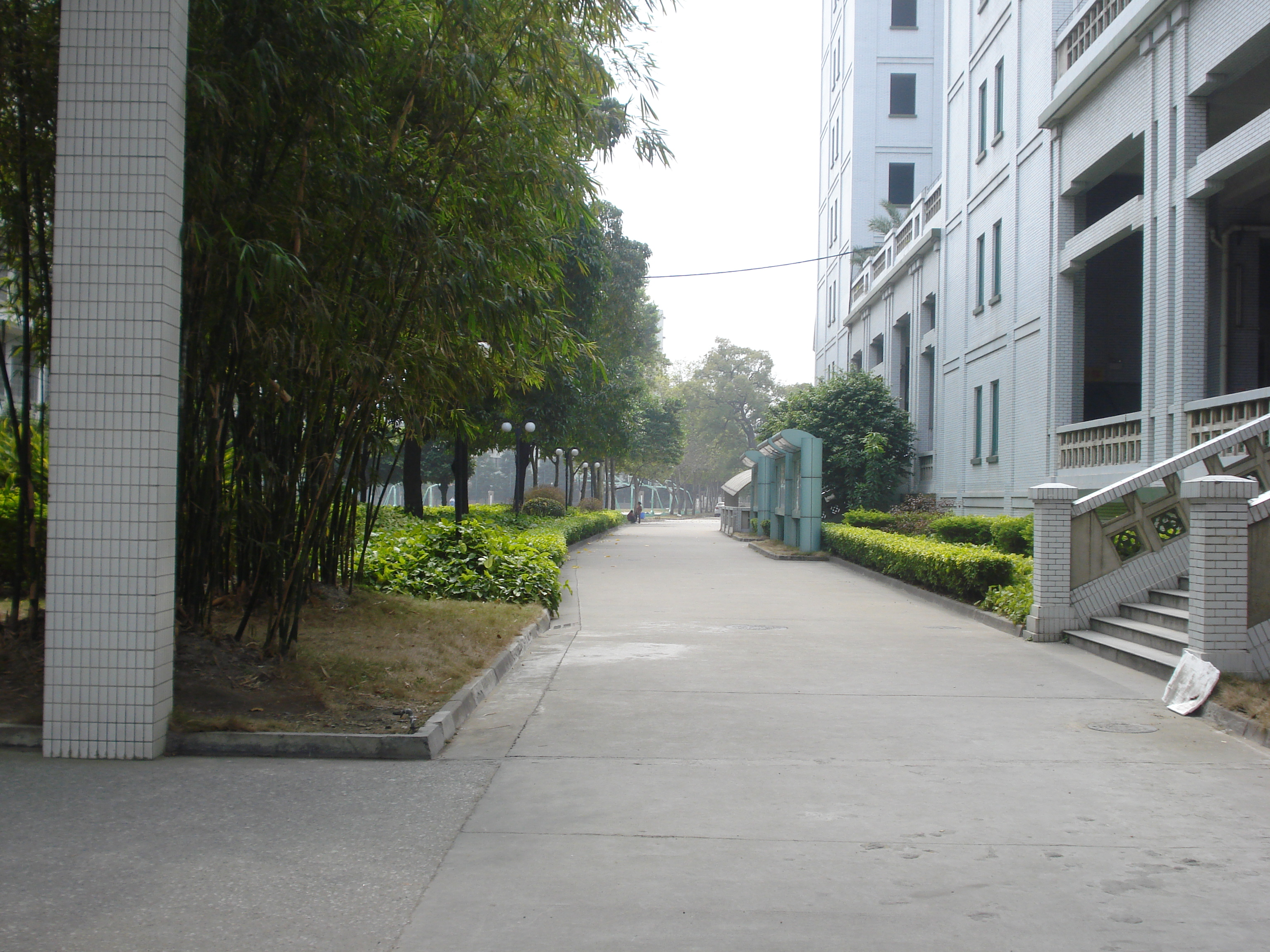 昔日的旧北街